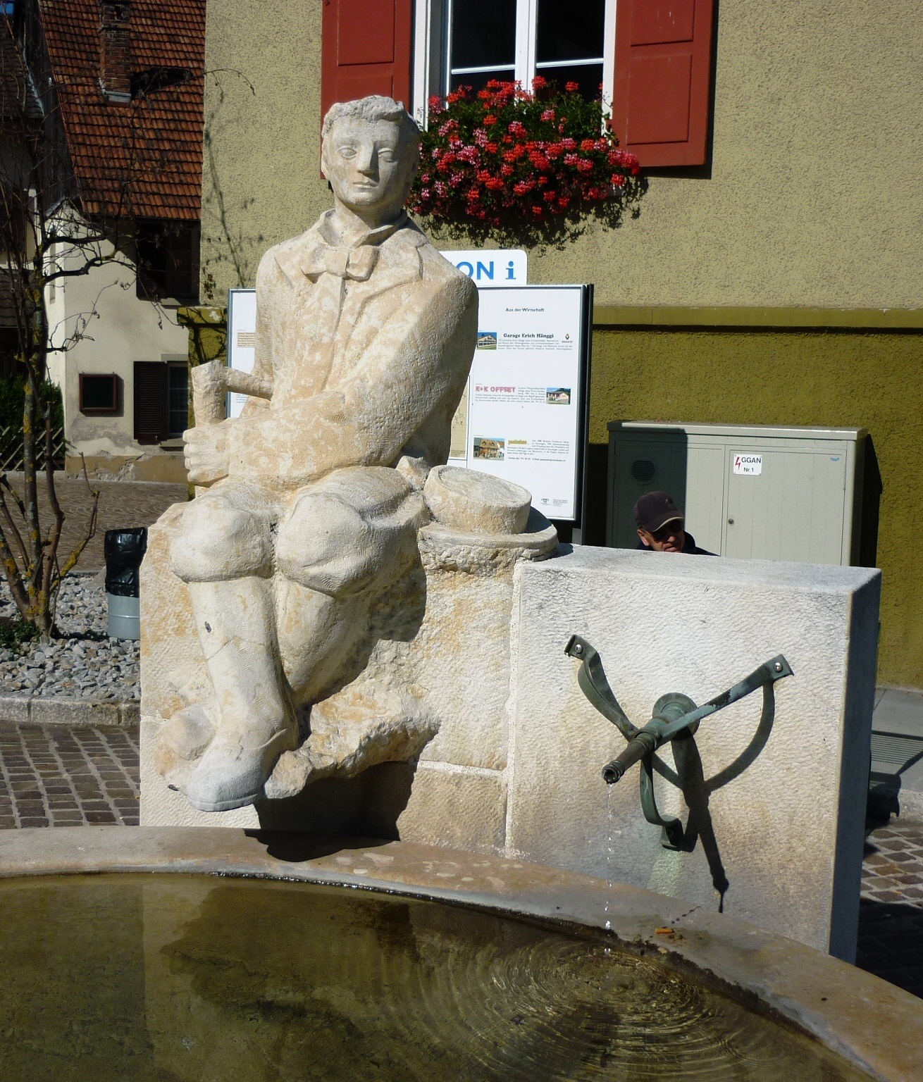 Schwarzbubenbrunnen vor dem Gemeindehaus in Nunningen SO, Schweiz